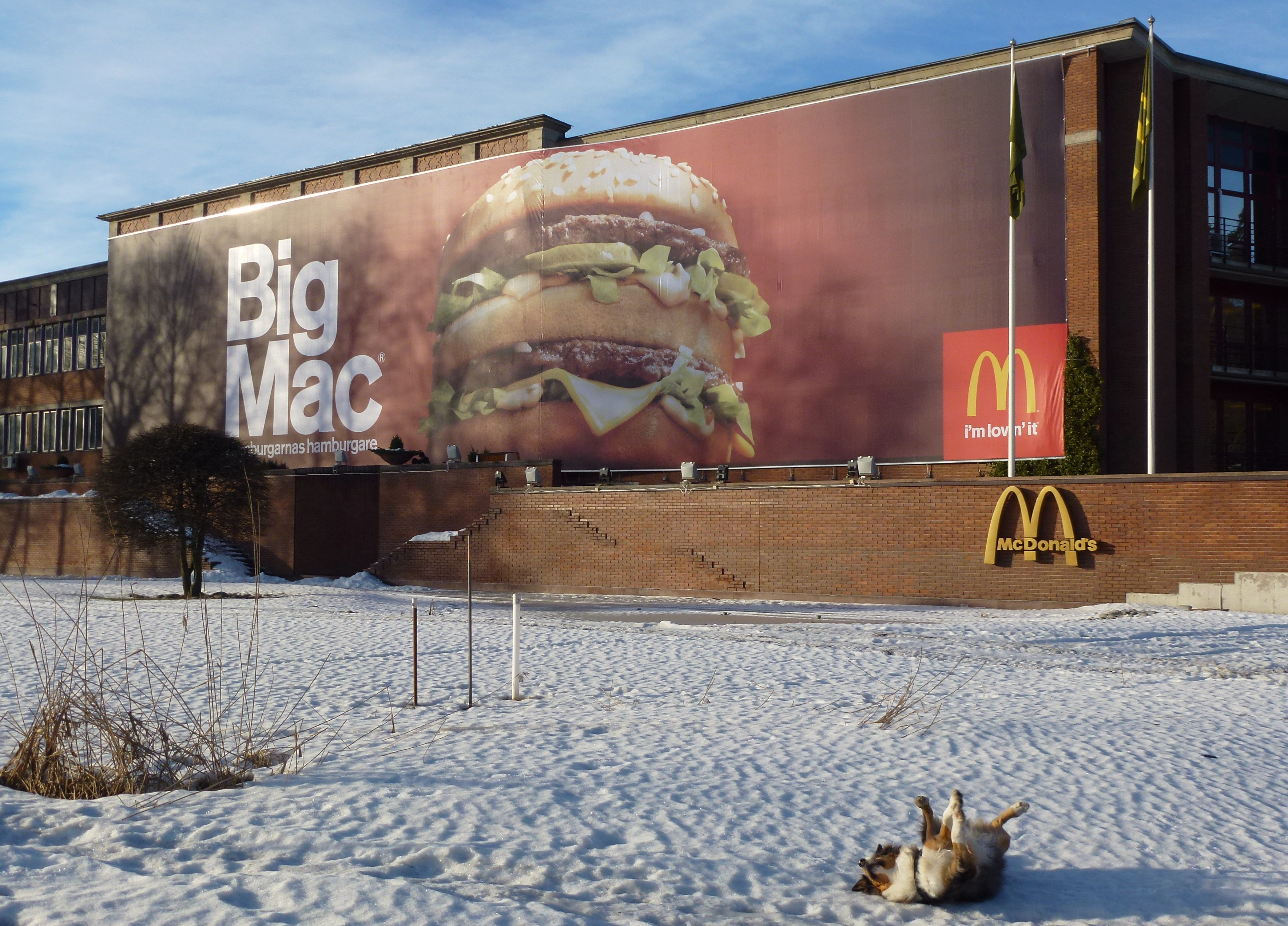 Mc Donalds svenska huvudkontor i Stockholm